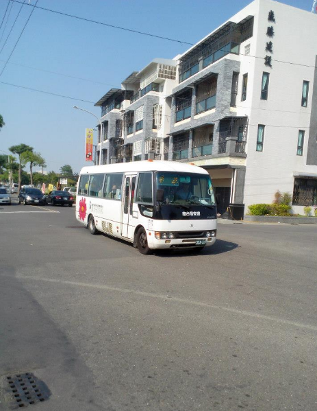 南台灣客運028-XH 2008 MITSUBISHI FUSO ROSA BE64DG